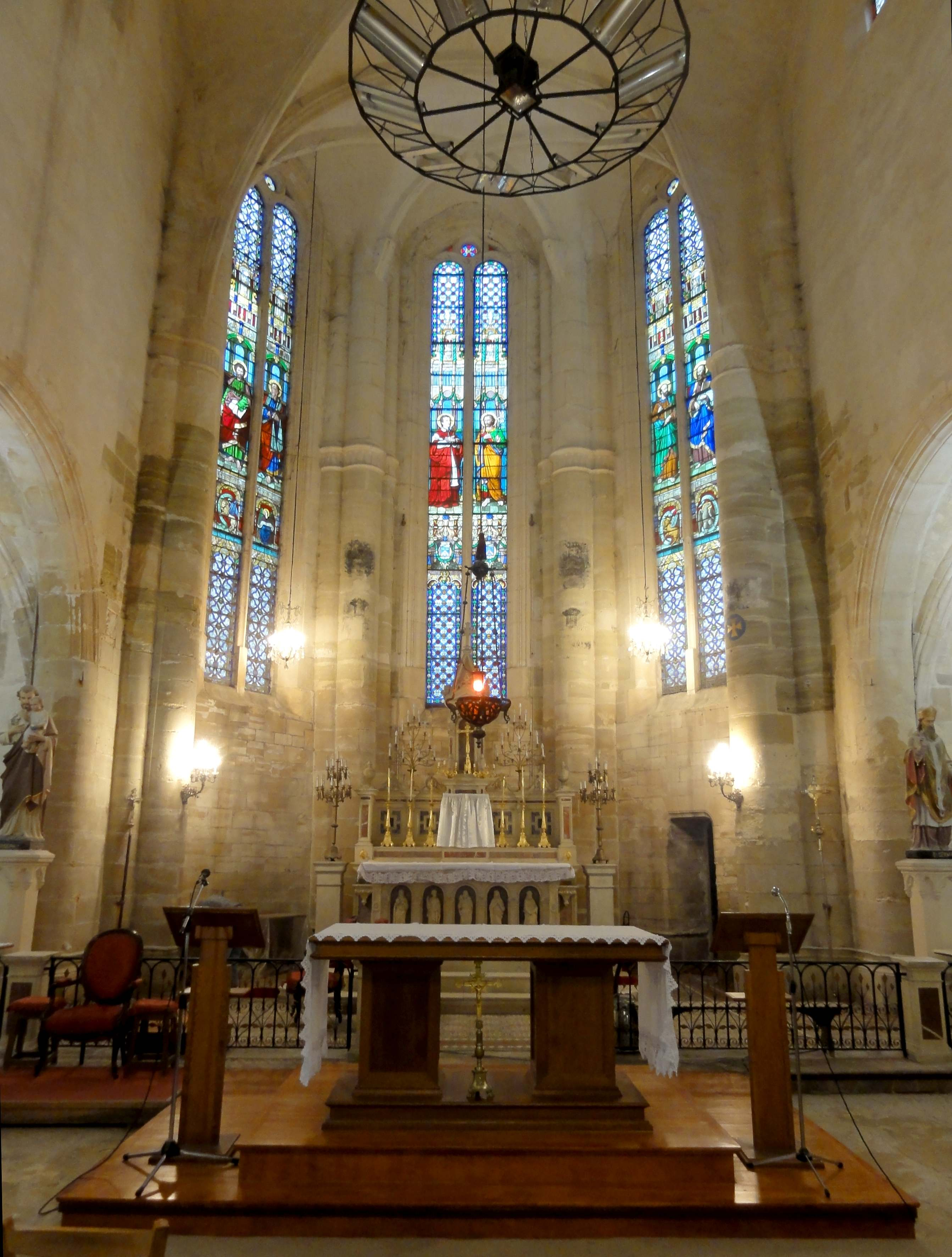 Intérieur de l'église - voir titre.